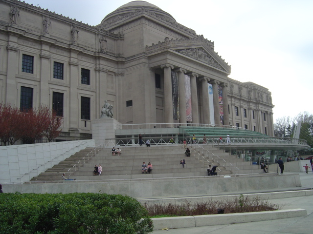 autre